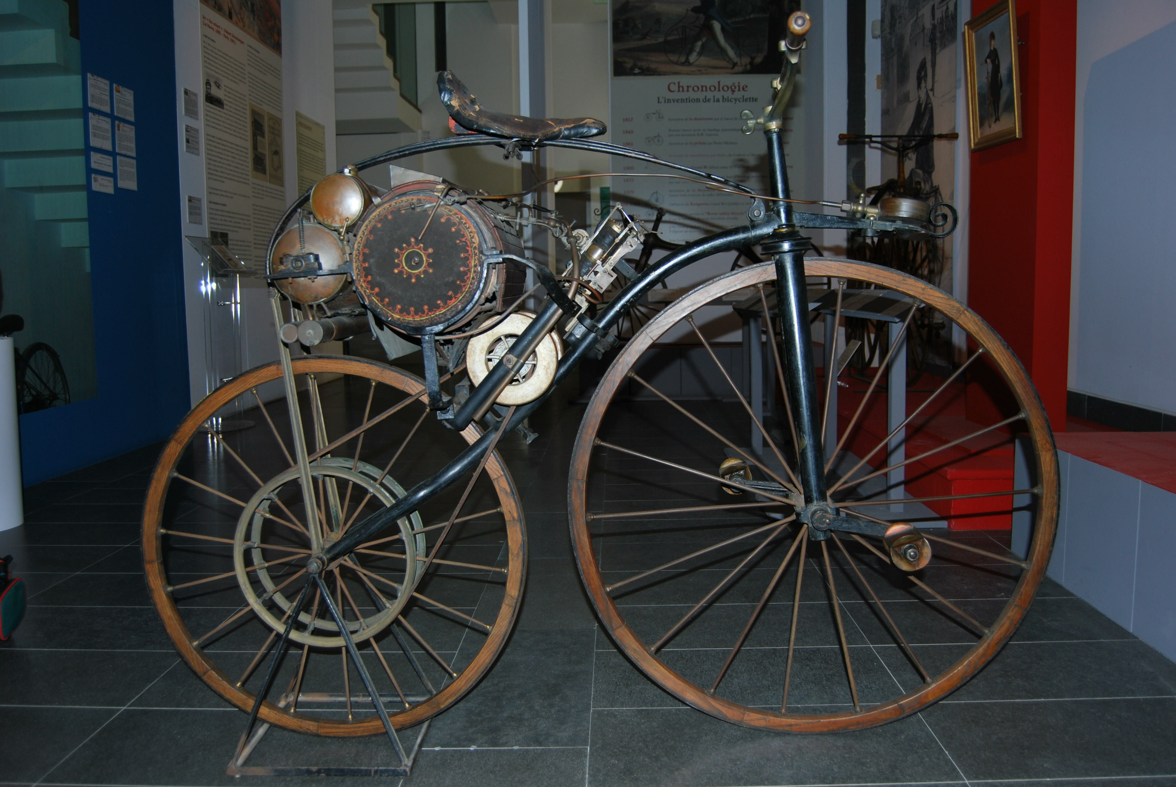 PERREAUX, 1ère moto de l'Histoire; auteur : Guy Rolland